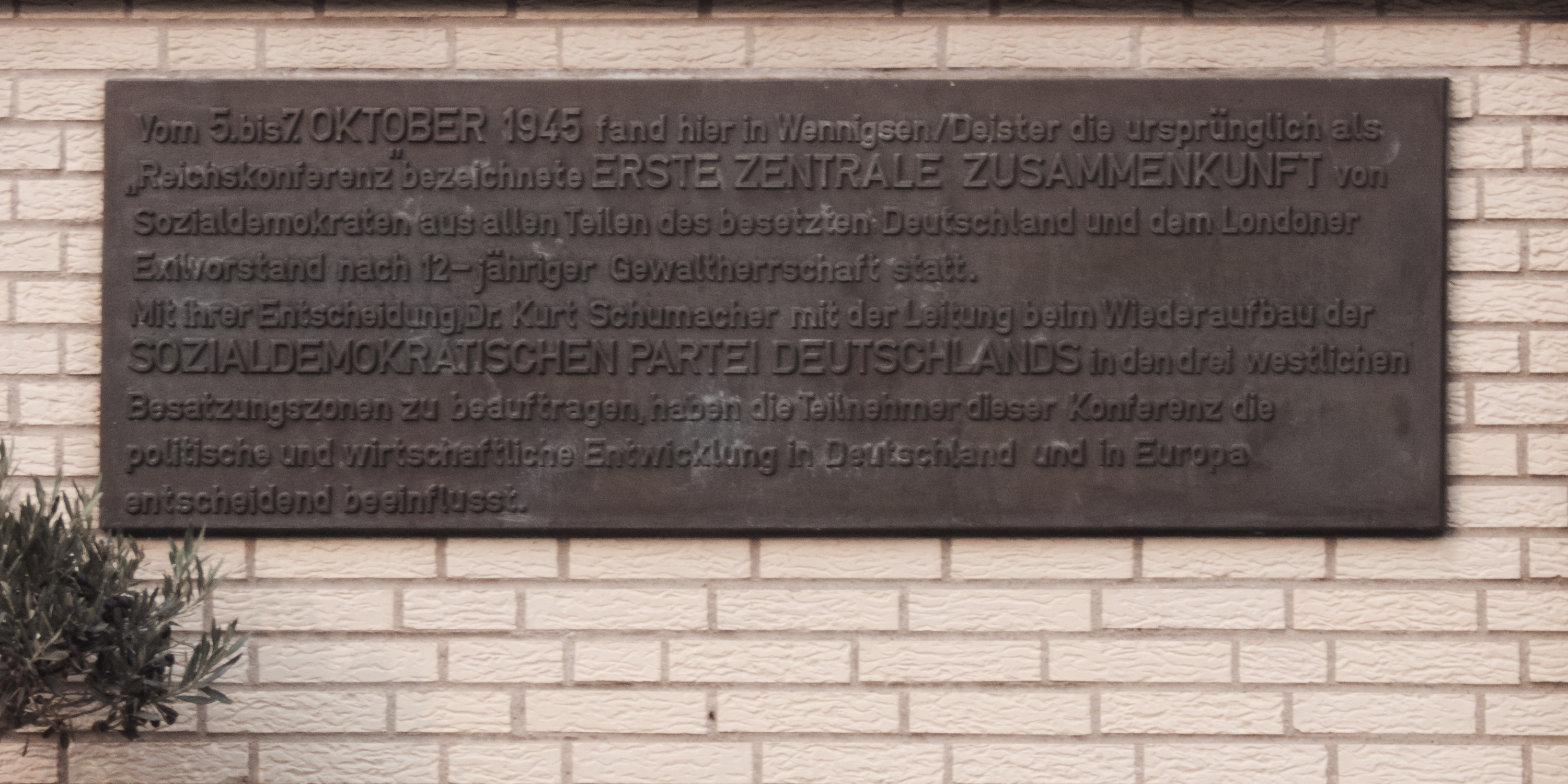 Gedenktafel für die Wennigser Konferenz 1945 am Nachfolgebau des Tagungslokals in der Bahnhofstraße in Wennigsen